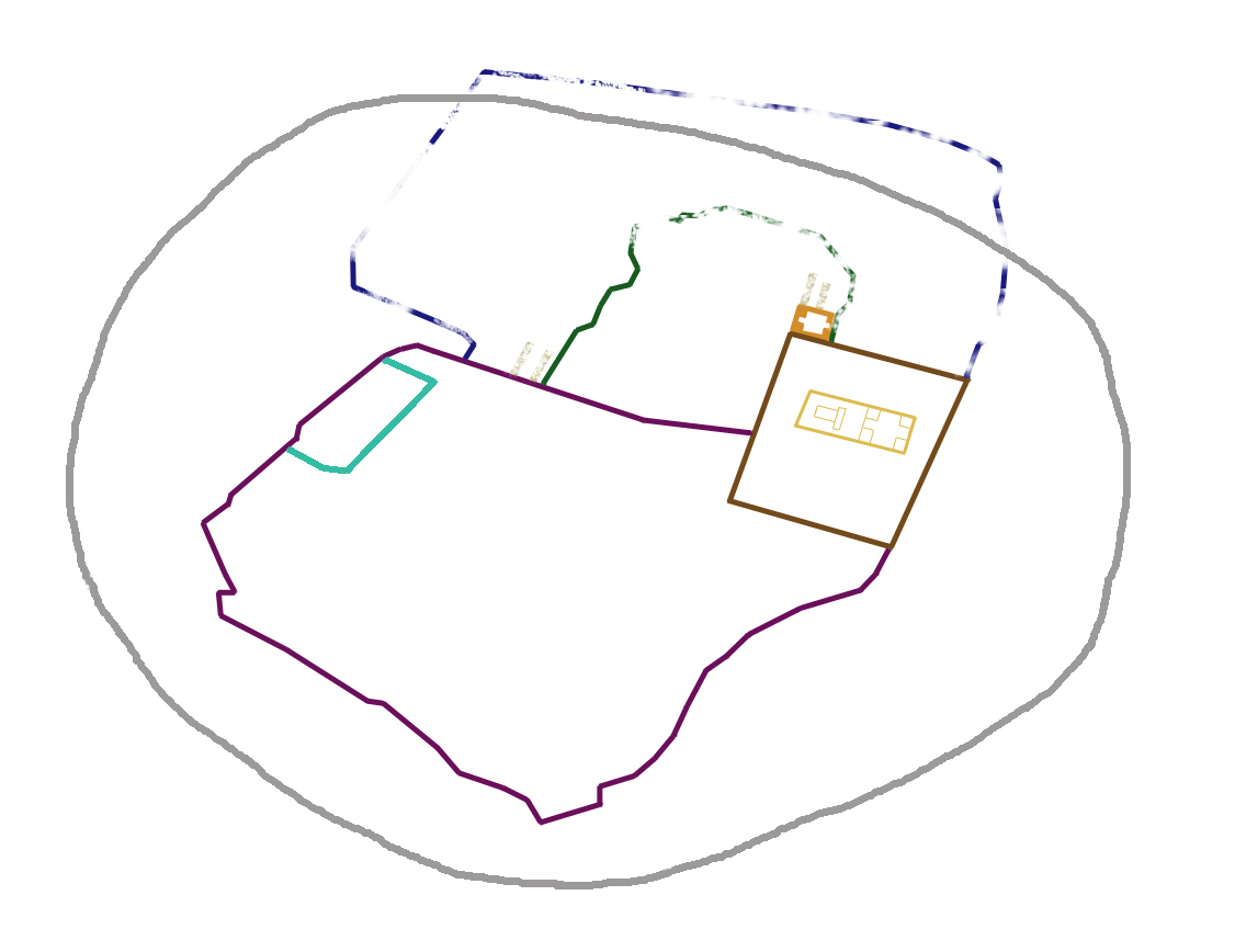 ירושלים 70 - הדייק